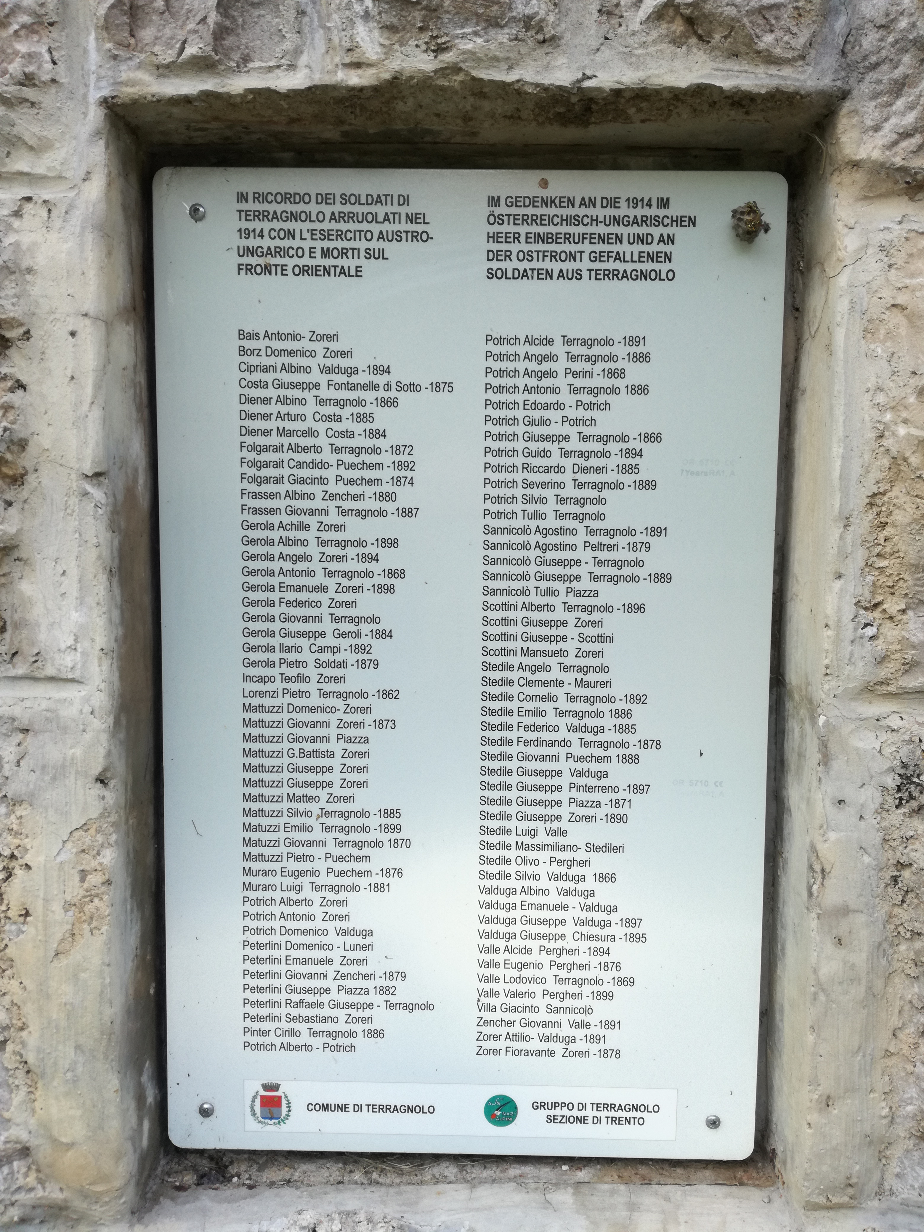 Gedenktafel an die aus Terragnolo stammenden Gefallenen der österreichisch-ungarischen Armee